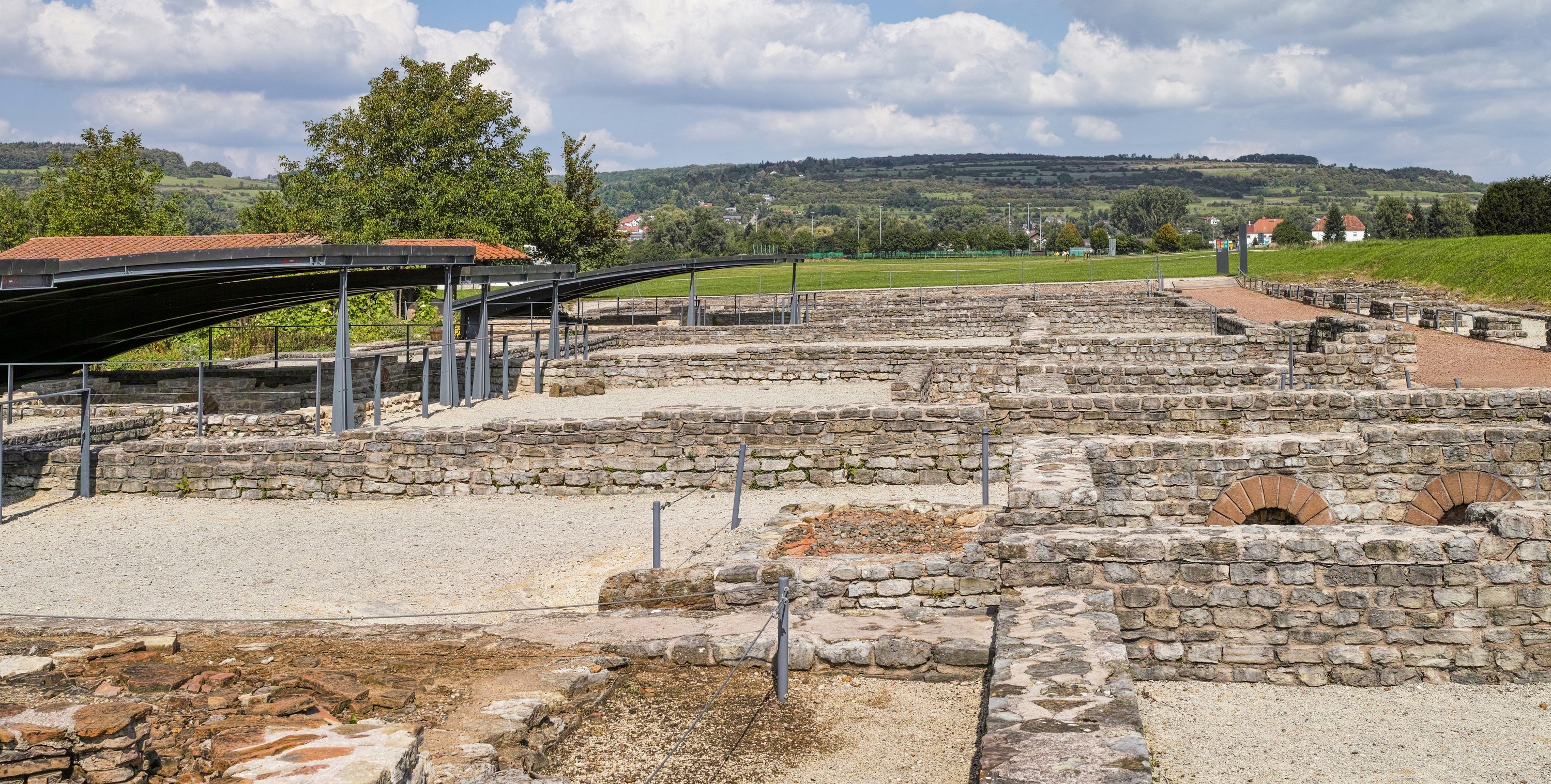 Europäischer Kulturpark Bliesbruck-Reinheim. Grabungsstätte Bliesbruck, römisches Handwerkerviertel.